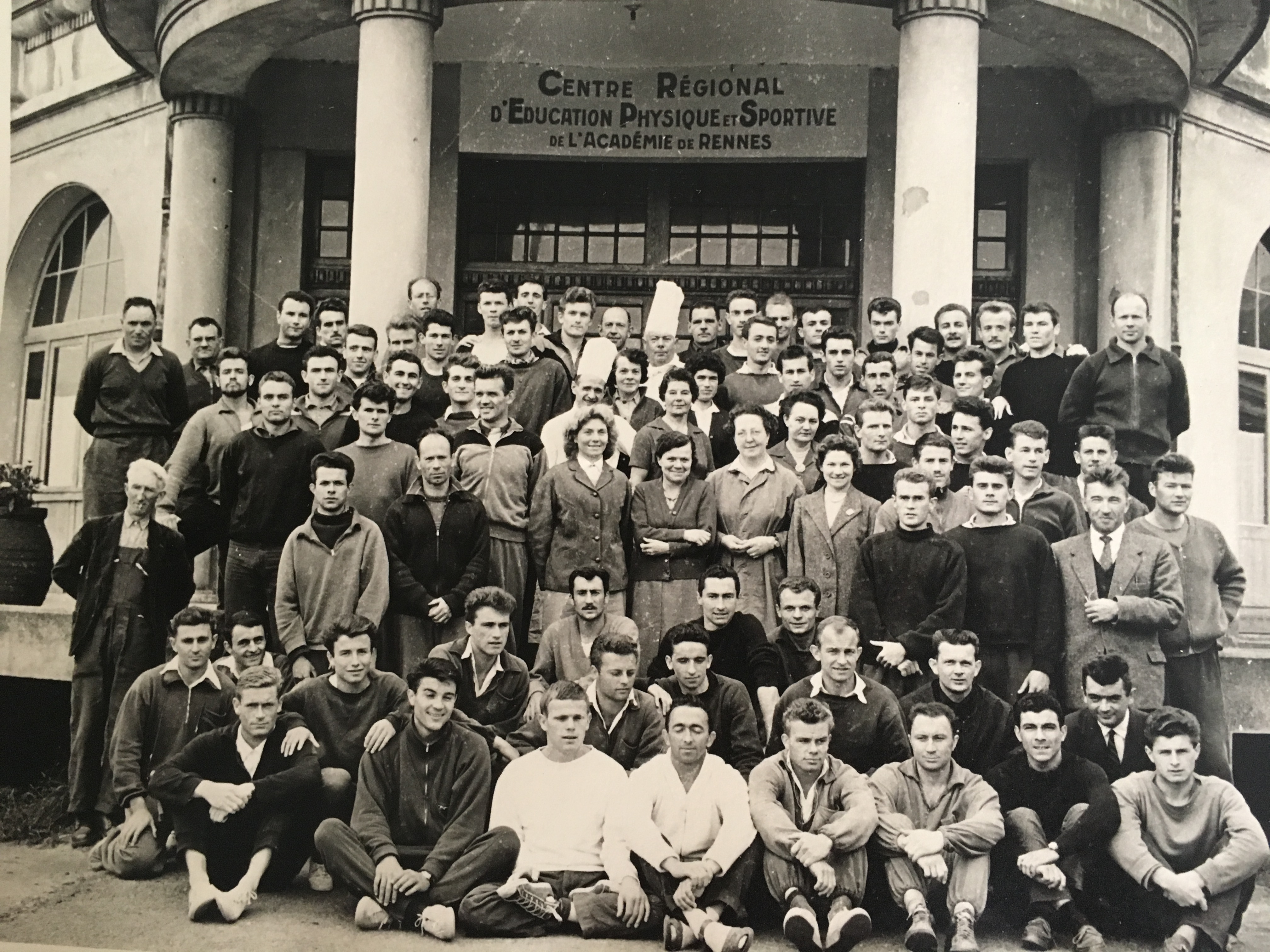 Photos de l'ensemble du personnel du CREPS de Dinard prise devant l'entrée du bâtiment historique dans les années 60